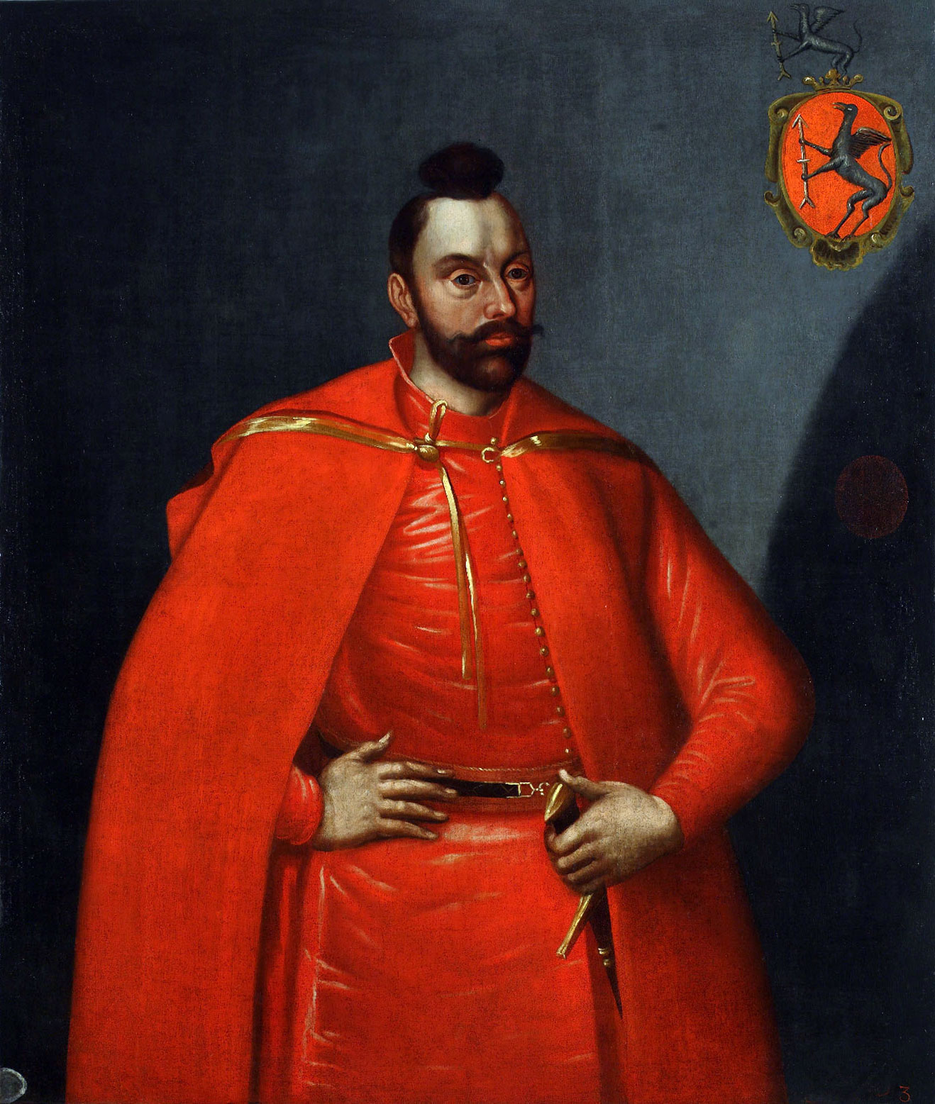 Беларуская (тарашкевіца): Партрэт Яна Караля Хадкевіча (Jan Karal Chadkievič) або невядомага прадстаўніка магнацкага роду графаў Хадкевічаў